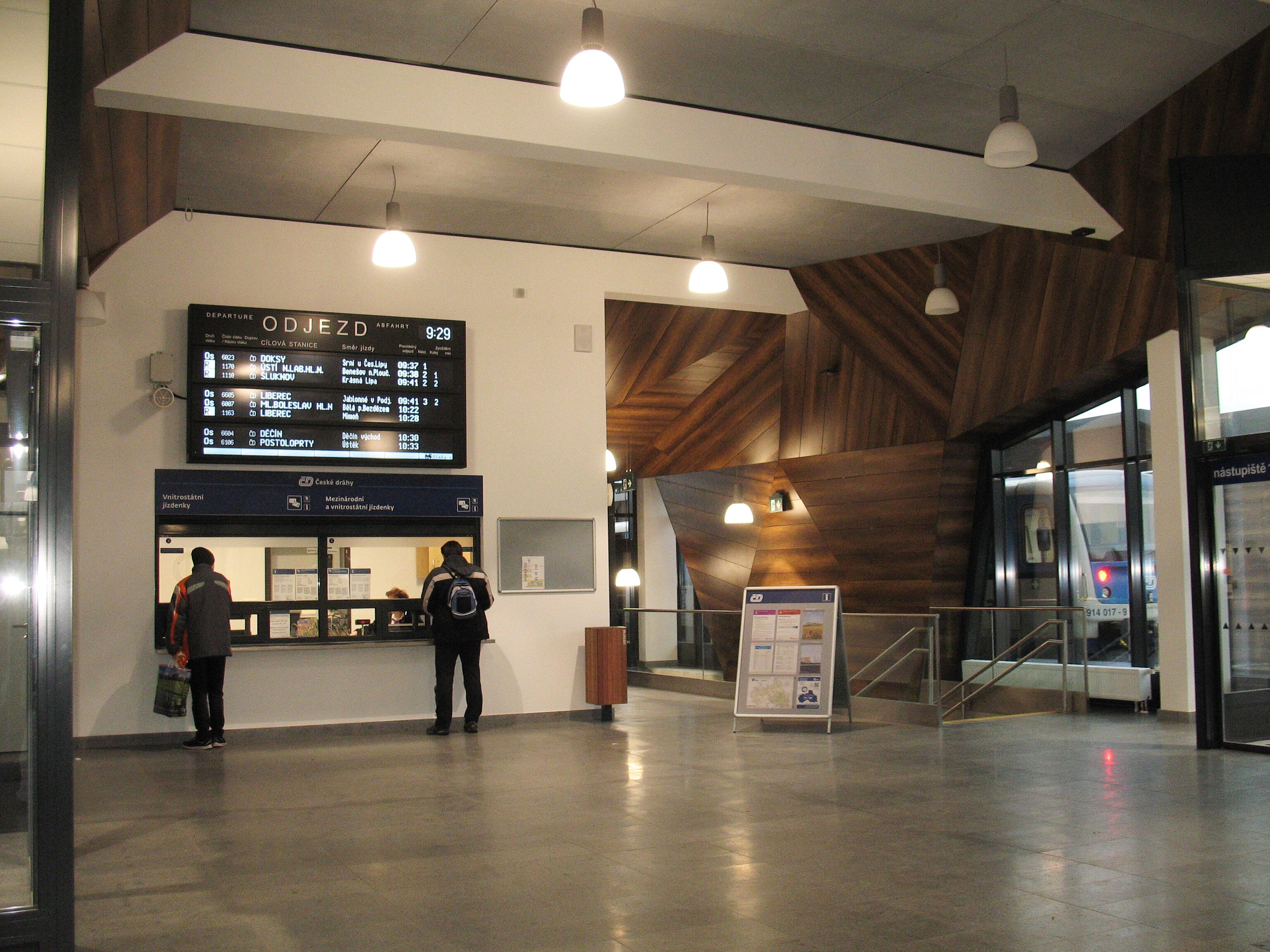 Nové hlavní nádraží v České Lípě bylo otevřeno v sobotu 17. 12. 2013